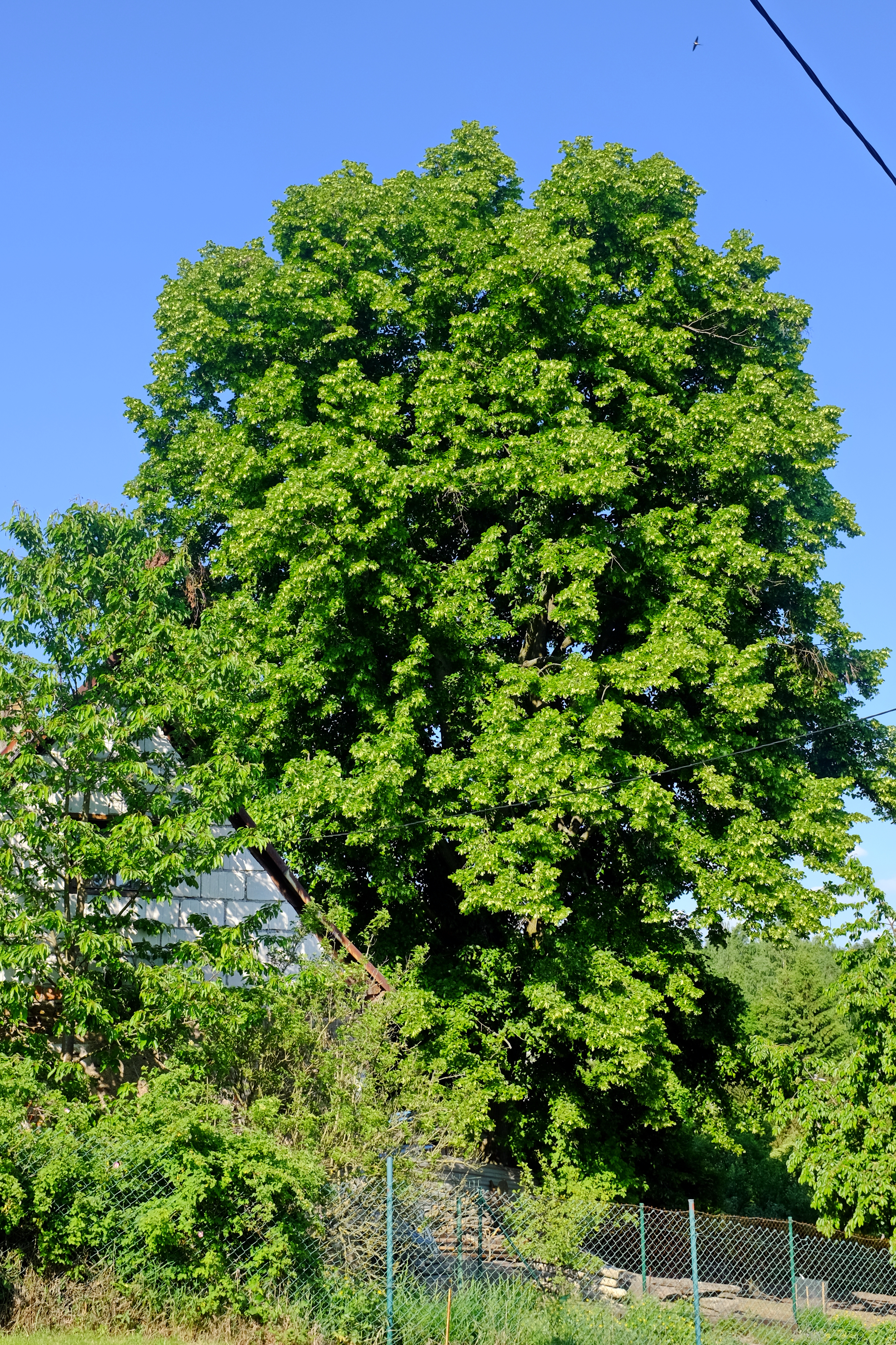 Památný strom - Anežská lípa - Krásný Les, okres Karlovy Vary